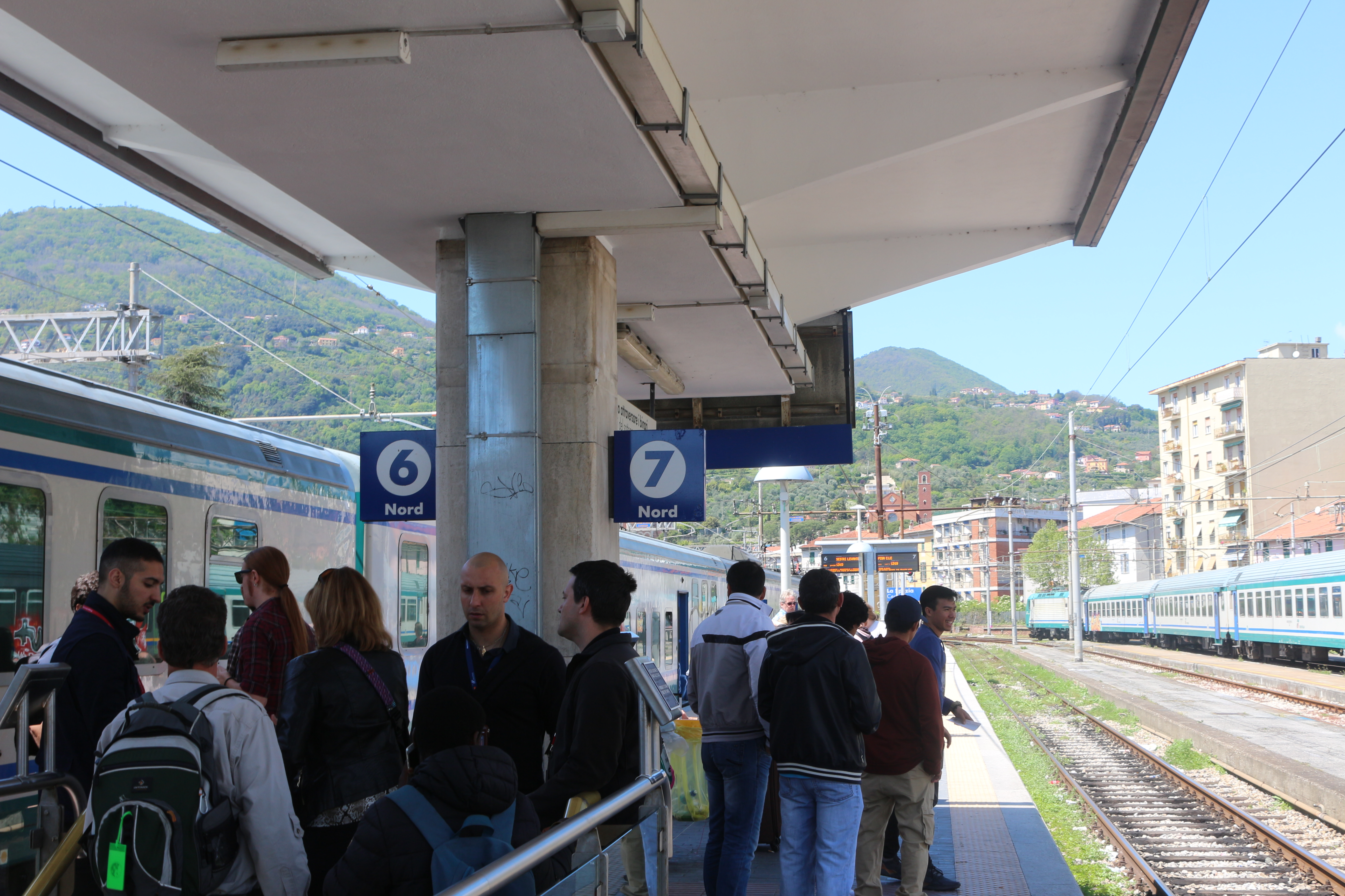 il personale controlla l'afflusso dei turisti ai treni alla stazione della Spezia il primo maggio. Sul binario 6 il treno per la Liguria, sul binario 7 quello per la Toscana